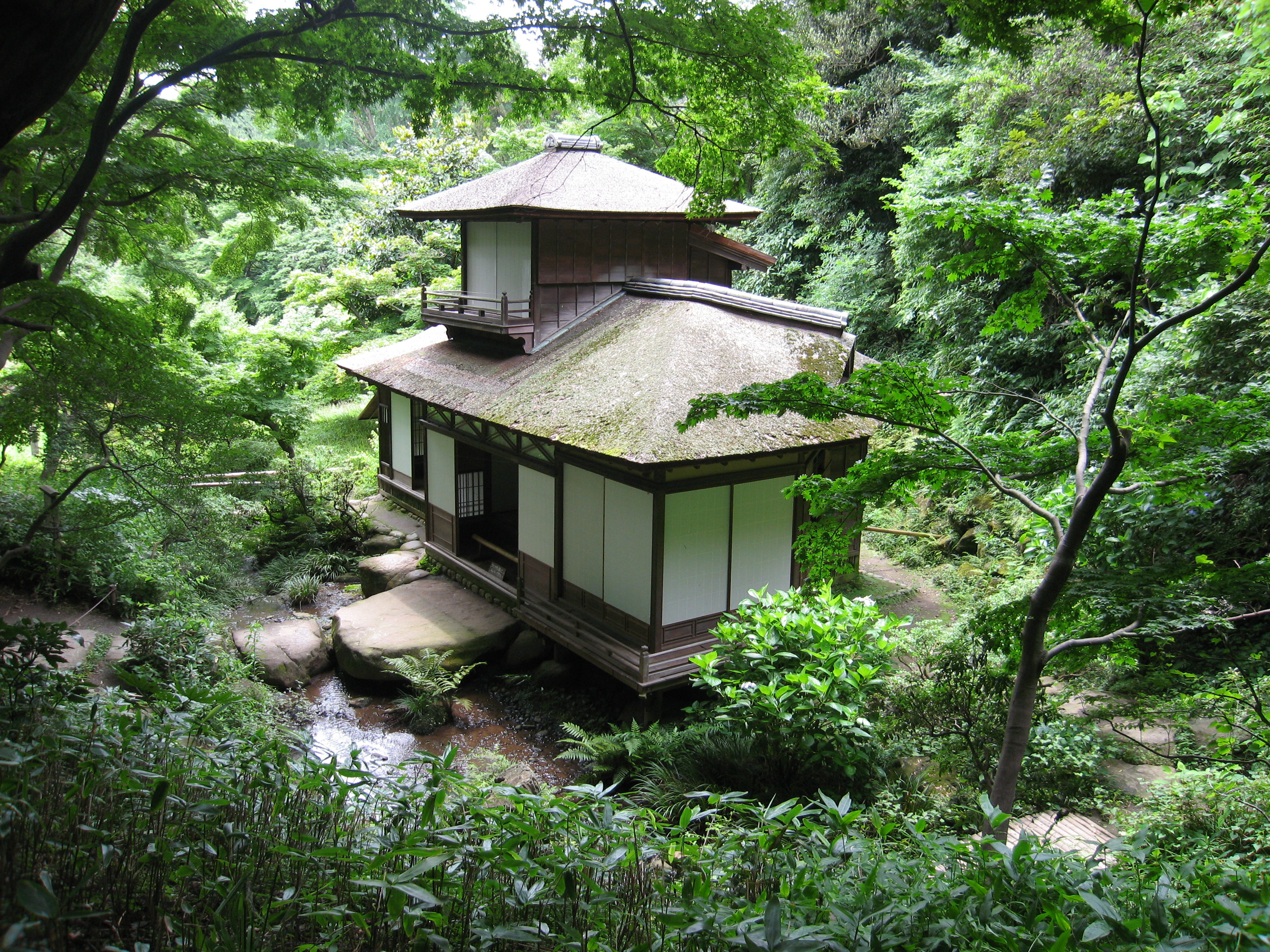 "Choushuukaku"at Sankeien, Yokohama, Japan